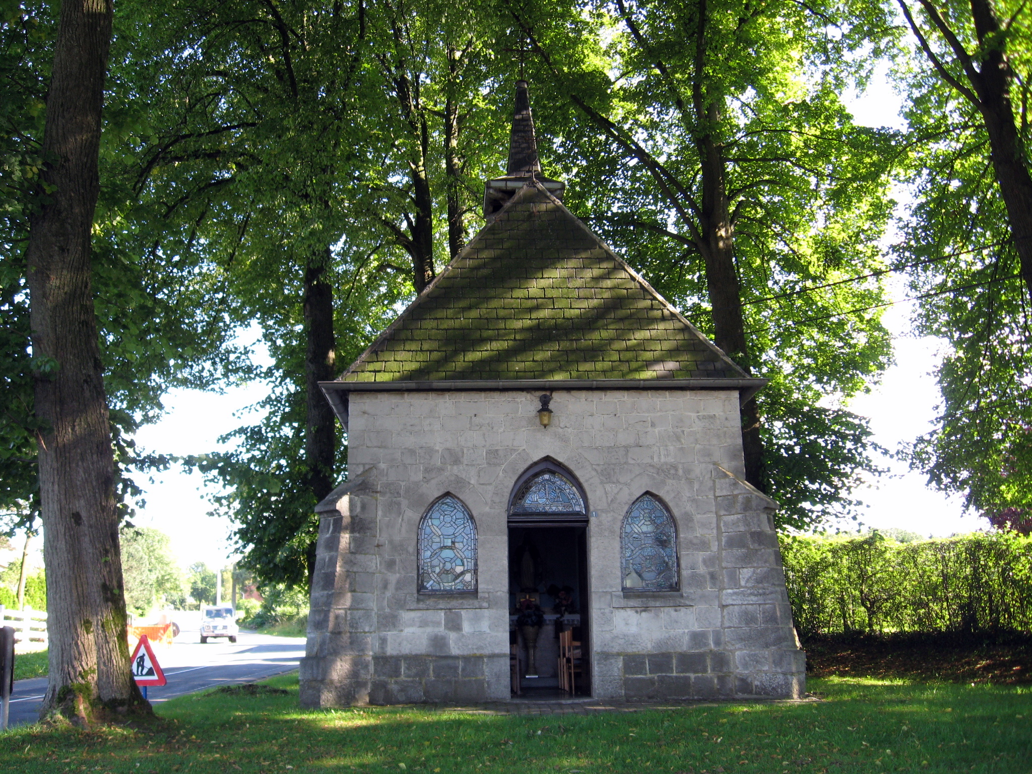 Sint-Rochuskapel in Schallenberg, Hauset